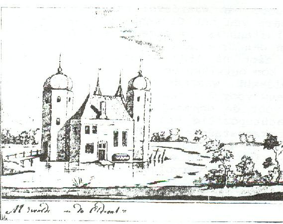 Tekening van Stellingwerf van de Ennemaborg in oude vorm.